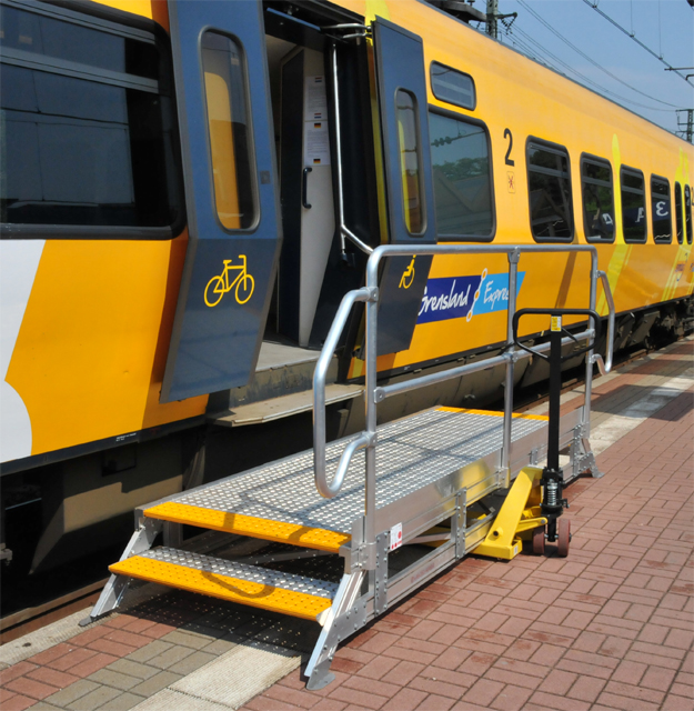 Verplaatsbaar perrondeel wegens te smalle treeplanken aan het treinstel. Deze kon met behulp van pompwagen verplaatst worden op het Station Bad Bentheim.